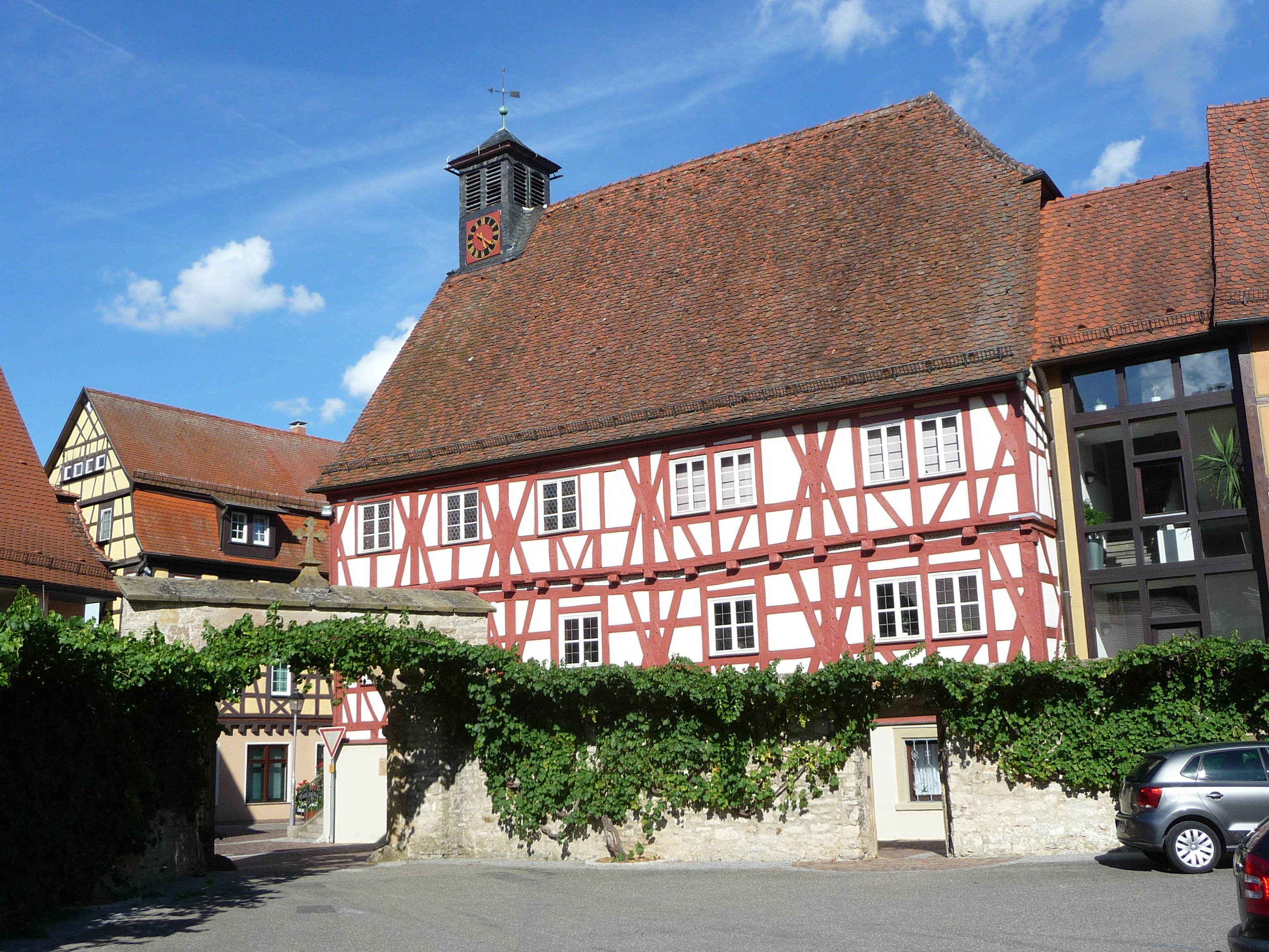 Das Rathaus wurde von Niedernhall 1477 erbaut. Dieses imposante Fachwerkgebäude zählt zu den besterhaltenen in ganz Ba-Wü-Franken.